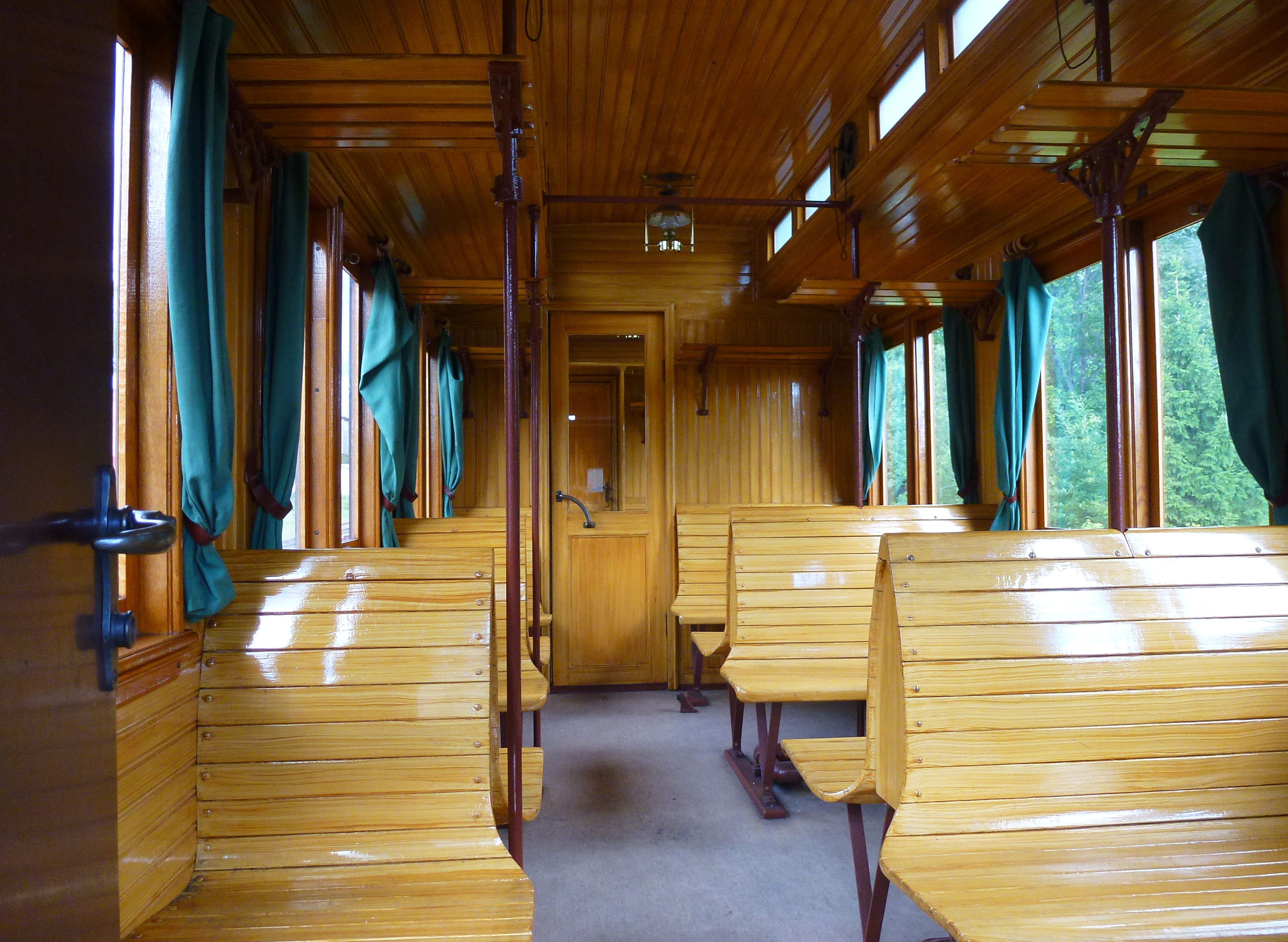 Lännakatten personvagn